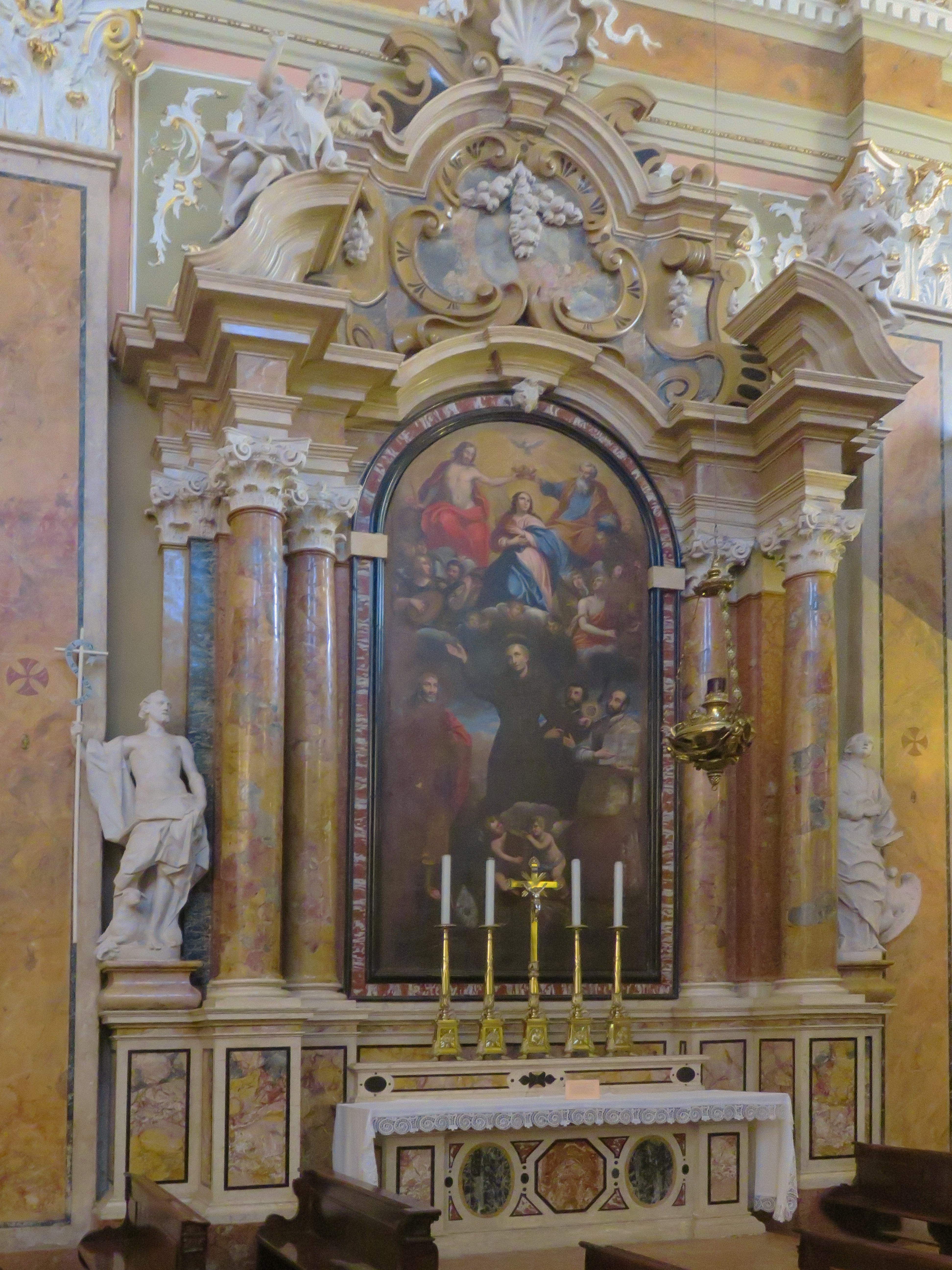 altare nella chiesa di San Marco